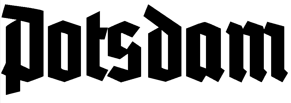 Schriftmuster (Potsdam)